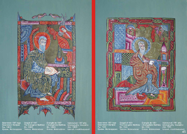 Առաքել Գեղամեցի